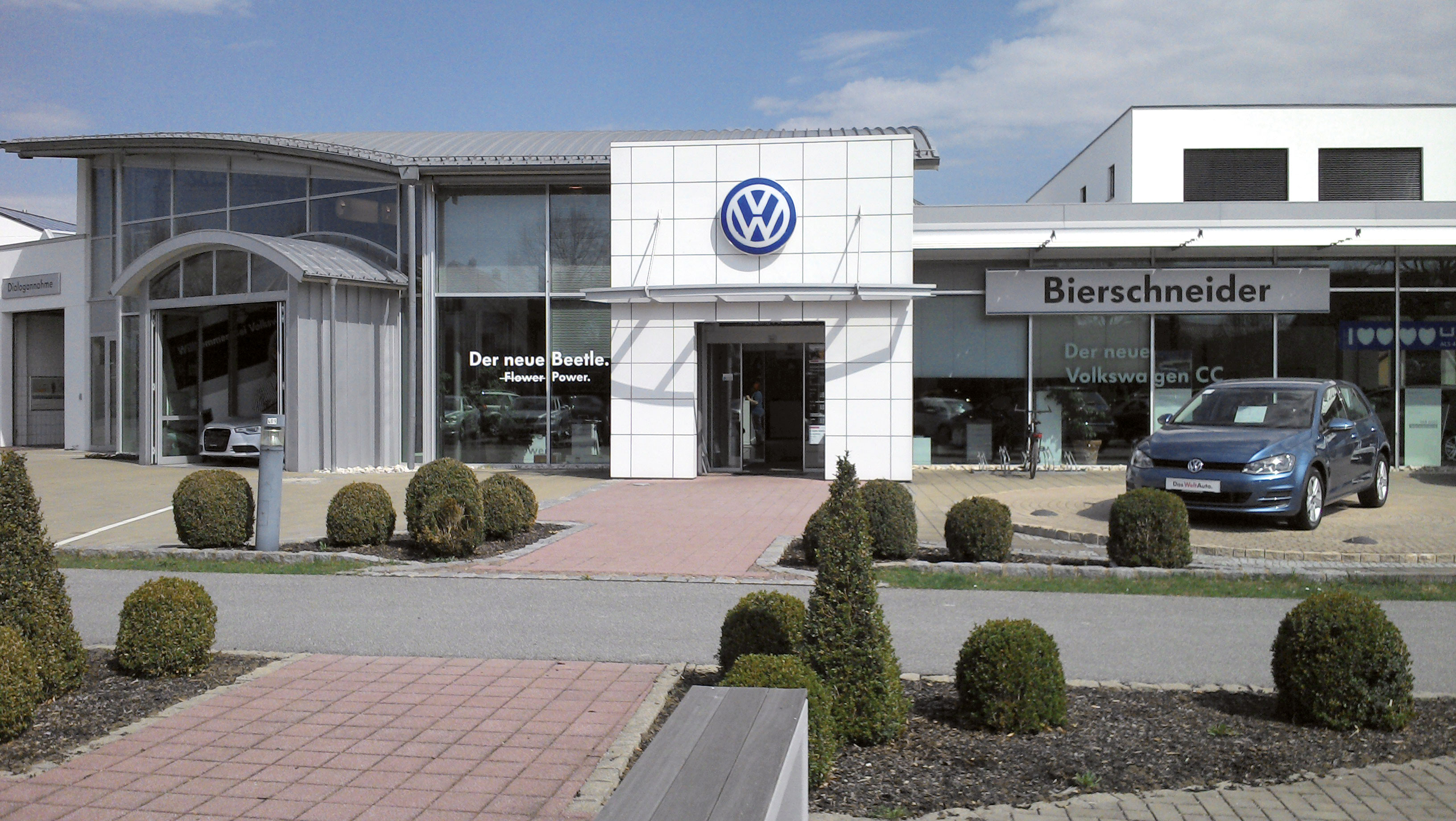 Hauptstandort Mühlhausen 2007 - Auto Bierschneider